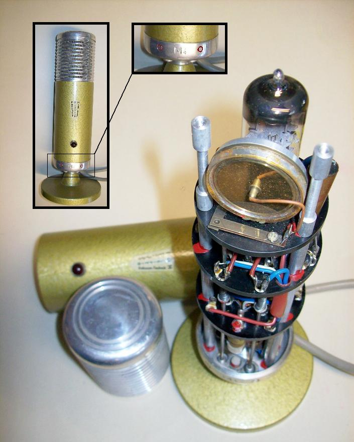 Kondensator Mikrofon mit ECC83 im Impedanzwandler / Vorverstärker, Hersteller: PGH Elektro-Medizin Vakuum-Technik Leipzig / DDR